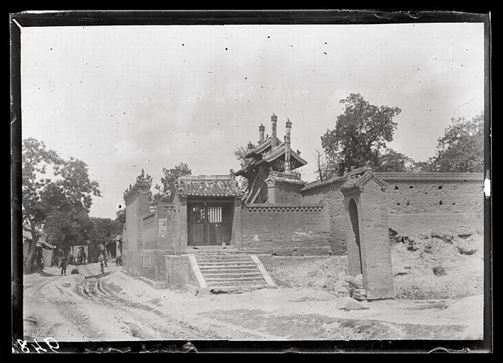 Henan. Henanfu, stèle marquant l'endroit où Confucius interrogea Laozi au sujet des rites